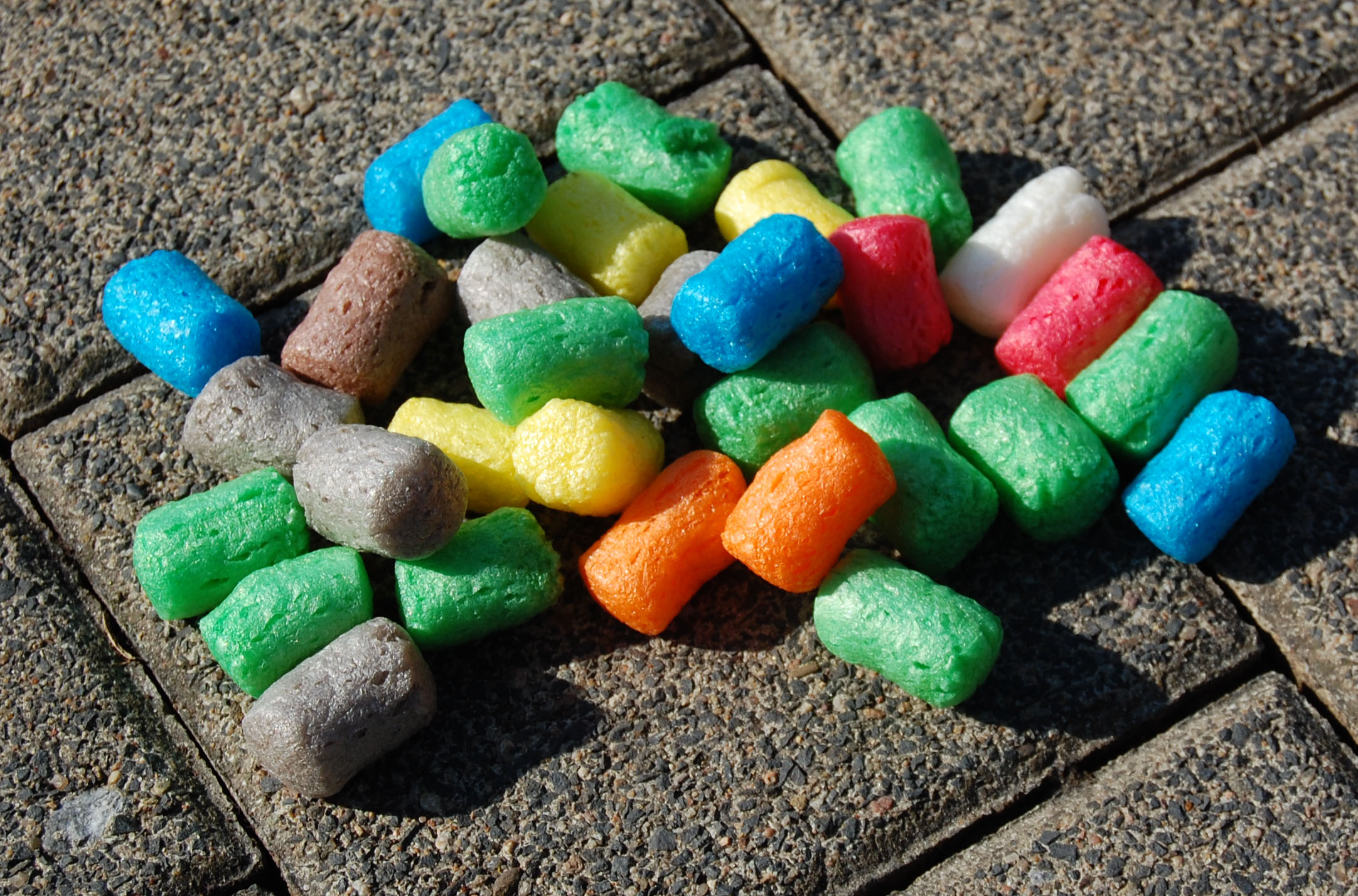 Maisstärke_Duroplast.